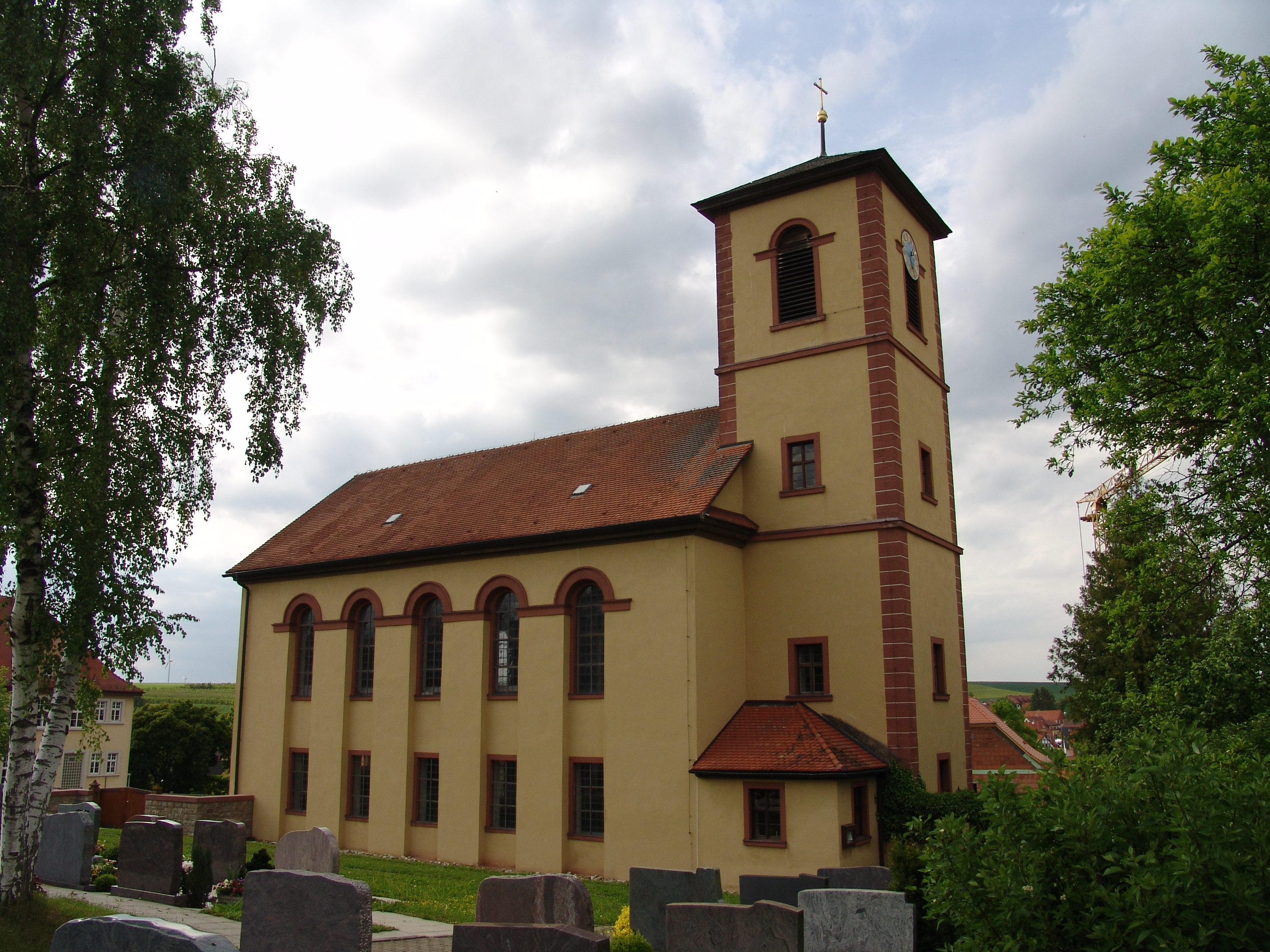 evang.-luth. Kirche in Oberaltertheim